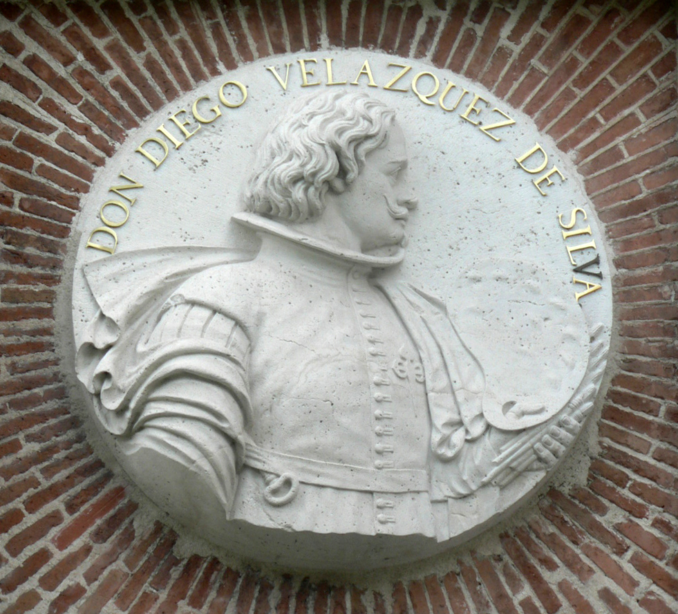 El pintor español Diego Rodríguez de Silva y Velázquez (Sevilla, 1599 – Madrid, 1660). Medallón incrustado en la fachada del Museo del ,Prado, Madrid.